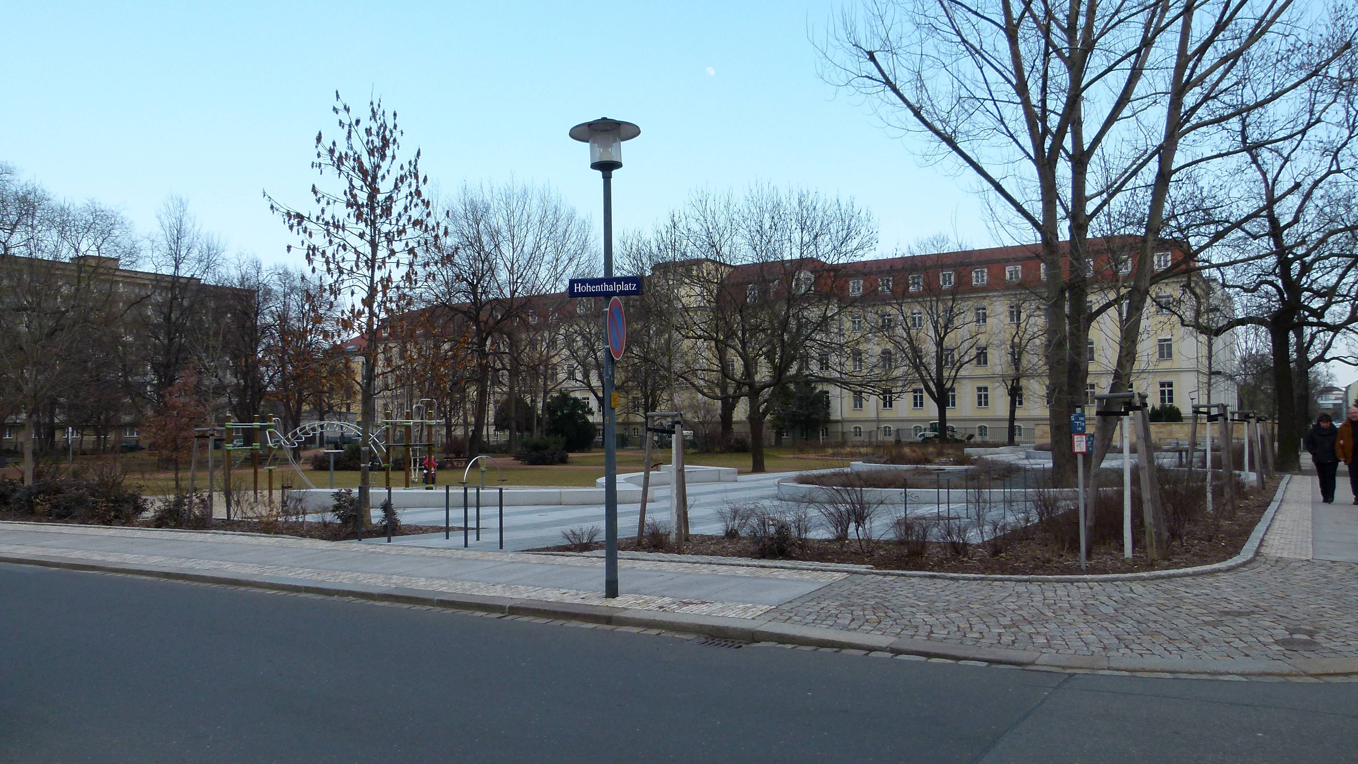 Hohenthalplatz, Ecke Vorwerkstraße, Wachsbleichstraße, dahinter Haus M des Khs. Friedrichstadt